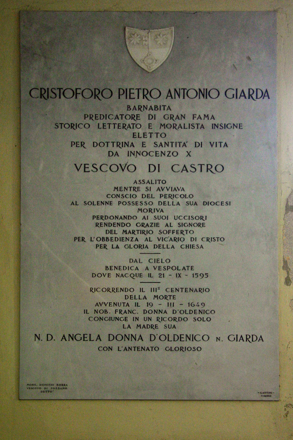 Lapide commemorativa a Mons. Cristoforo Giarda all'interno della chiesa parrocchiale di Vespolate (NO)